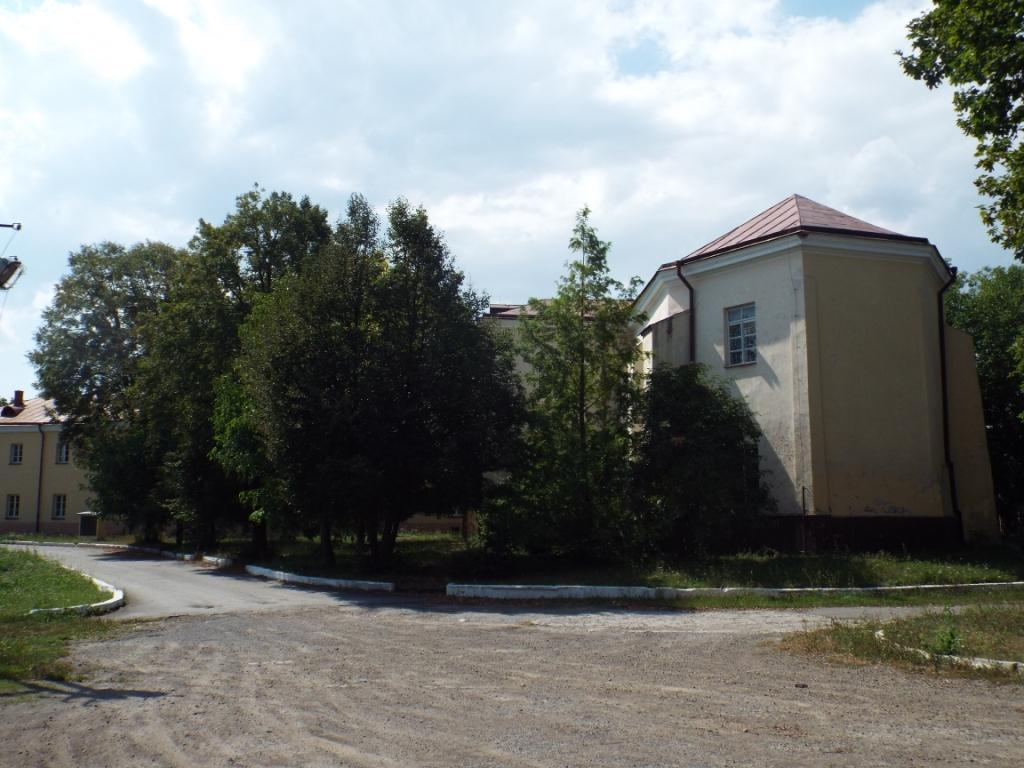 Комплекс колишнього монастиря августіанів в Красноставі. Фото І. Парнікози. 2017 р.